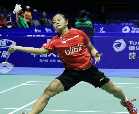 Fitriani